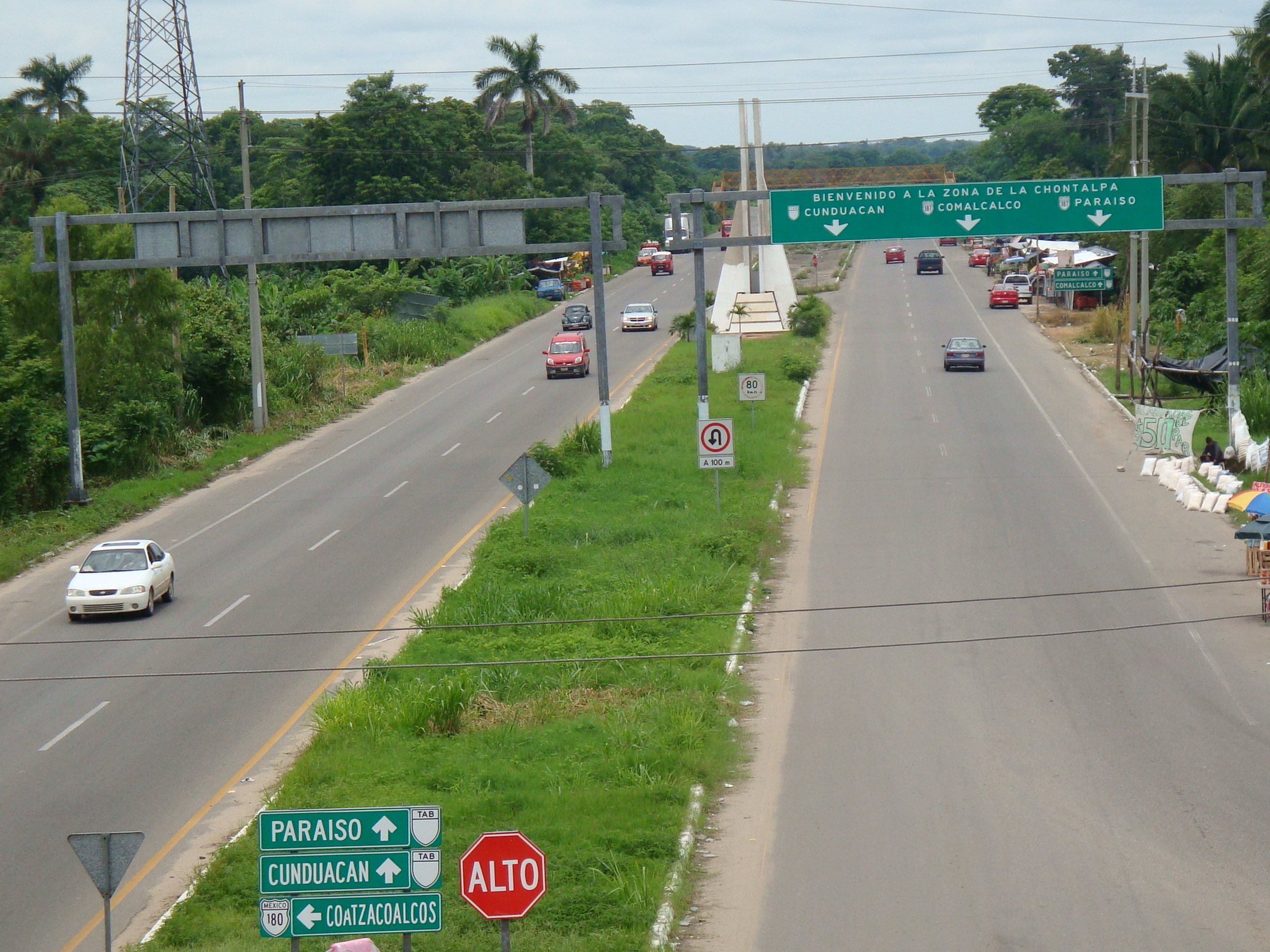 Autopísta de 4 carriles La Isla-Dos Bocas, que comunica a la capital del estado Villahermosa, con los municipios de Cunduacán, Comalcalco y Paraíso, en el estado de Tabasco, México